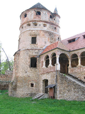 Castelul Bethlen din Cris/ Kreisch/ Keresd